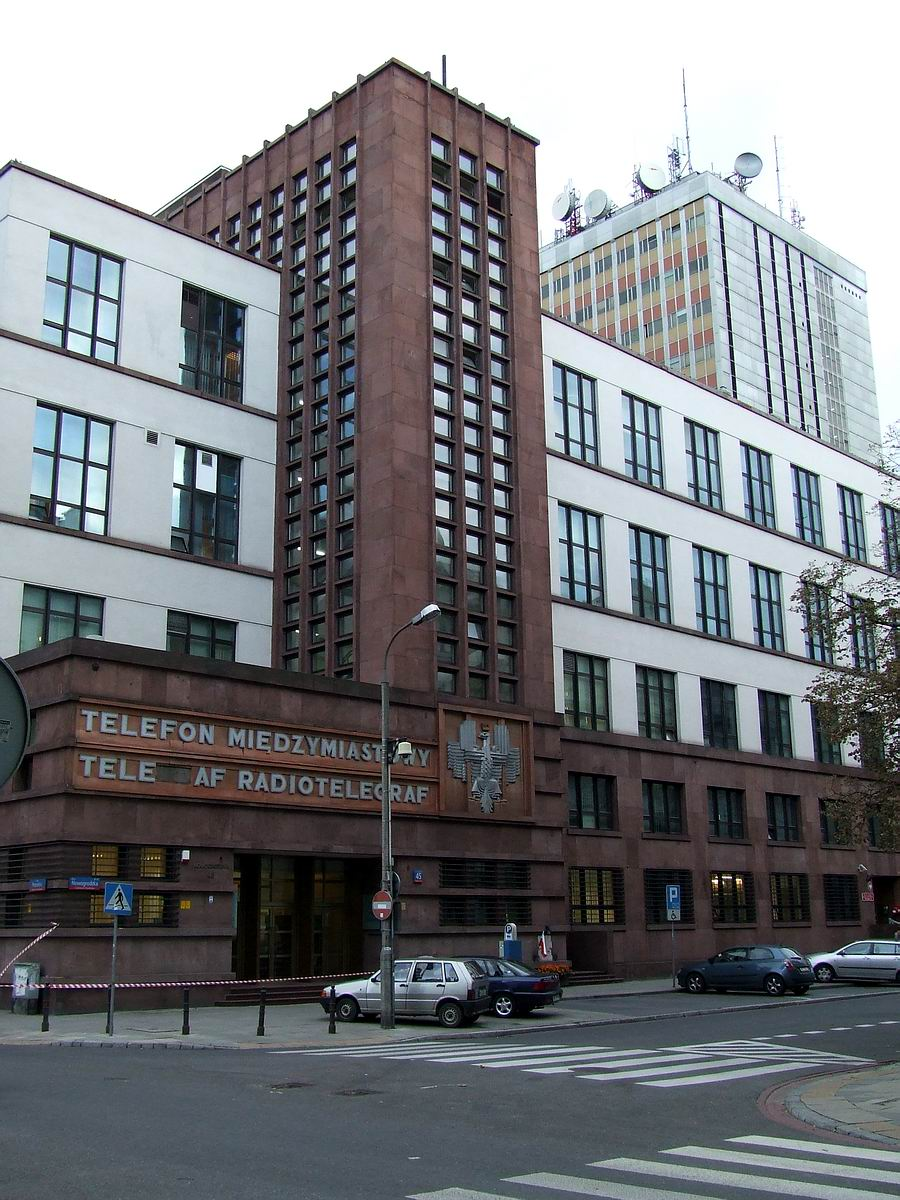 Warsaw, TP SA skyscrapper on Nowogrodzka street